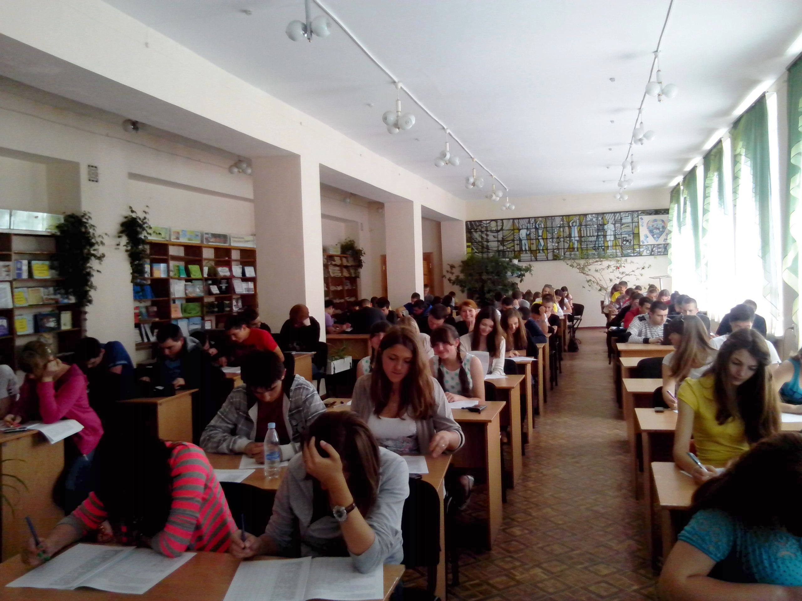 Читальний зал Хмельницького політехнічного коледжу